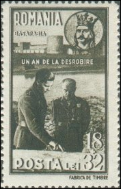 Почтовая марка Румынии. Бендерская крепость